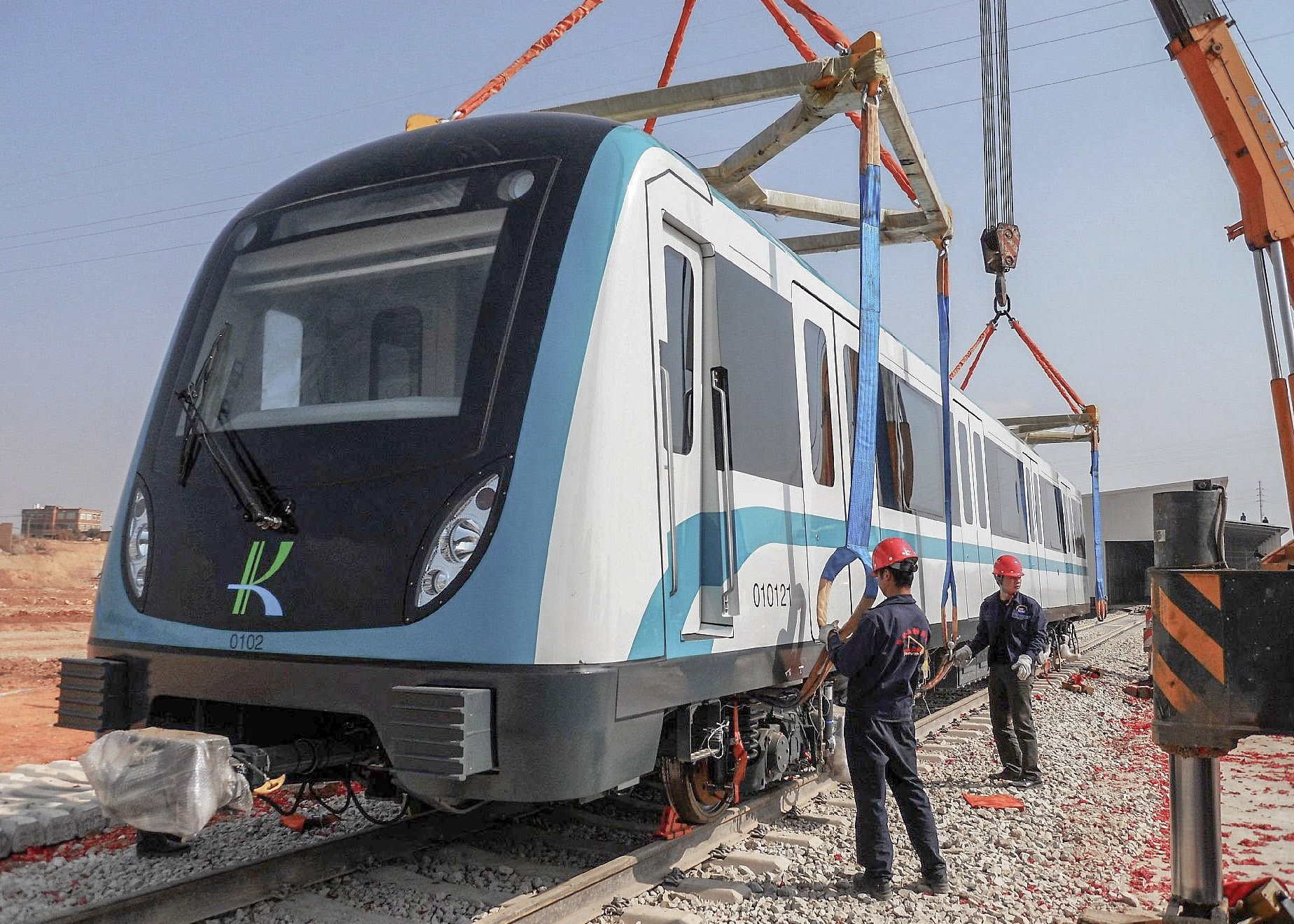 昆明地铁首辆车辆